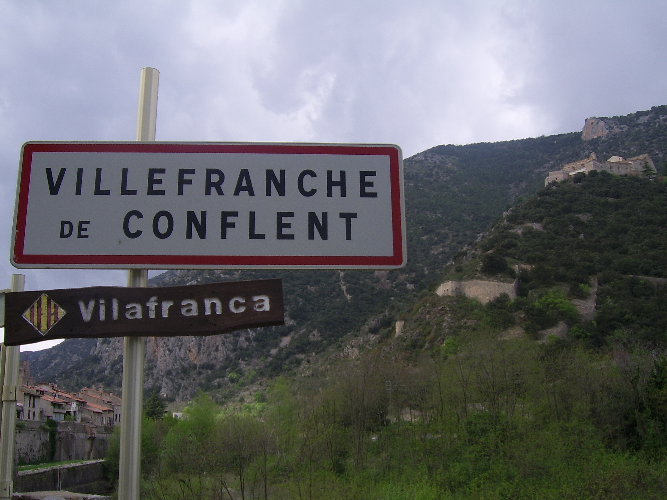 photo prise en avril 2006